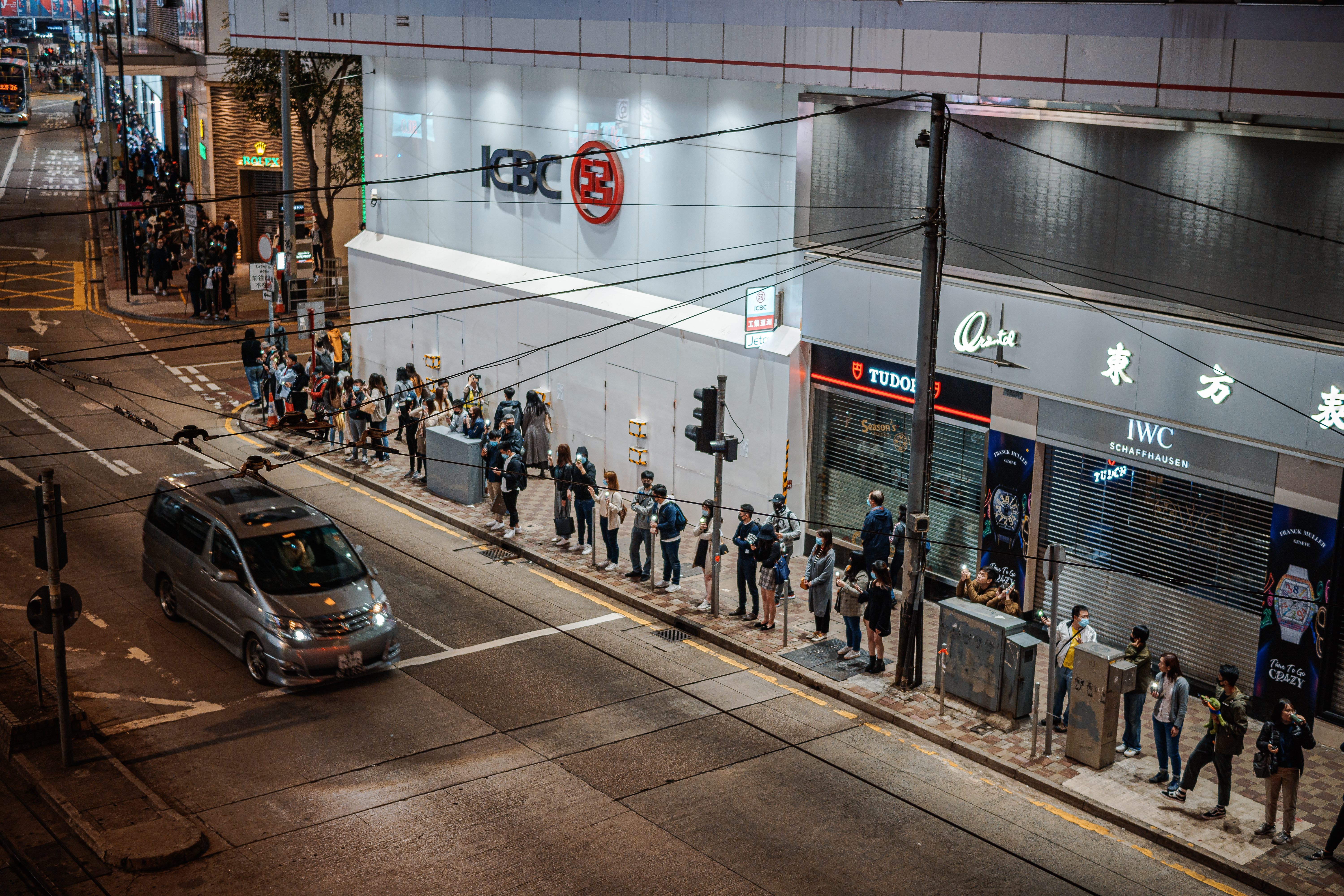 SDIM0168